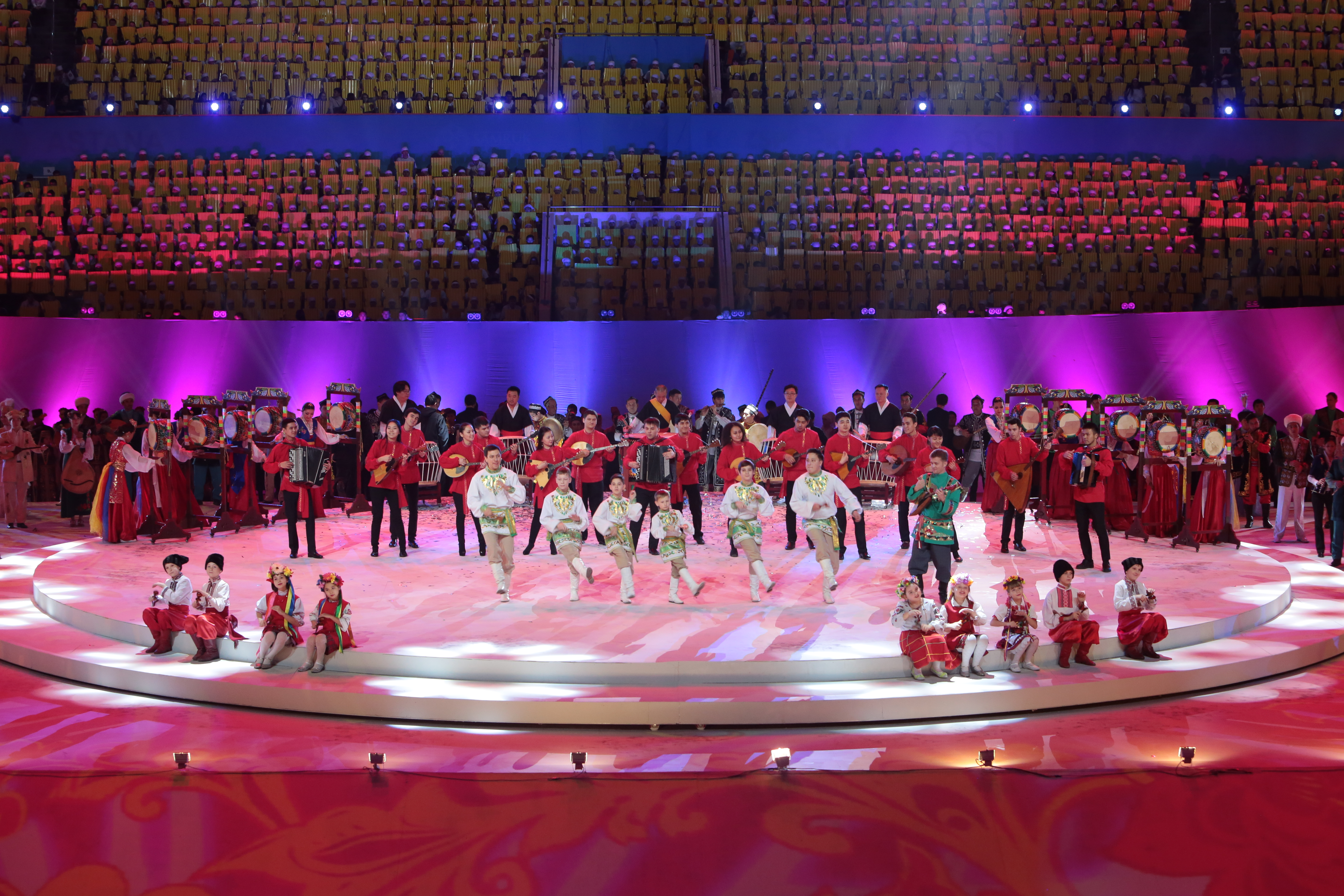 "Парни Саб Ложки" на выступлении в концерте посвященному 25 лет независимости республики Казахстан